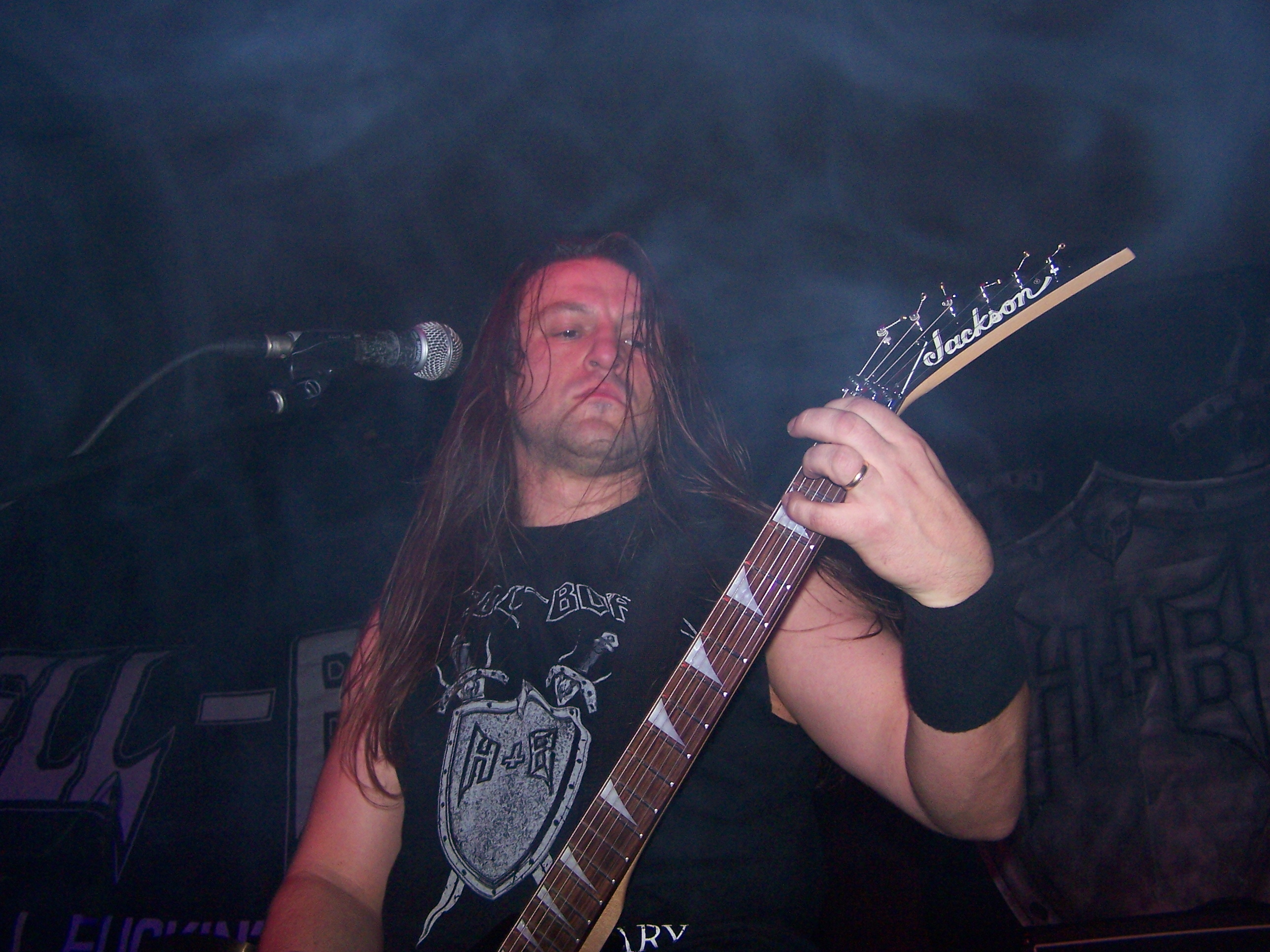 Jeff - wokalista wspomagający i gitarzysta zespołu Hell-Born podczas koncertu w katowickim Mega Clubie.